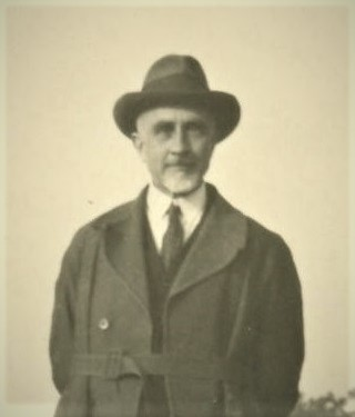 Gustavo Giovannoni